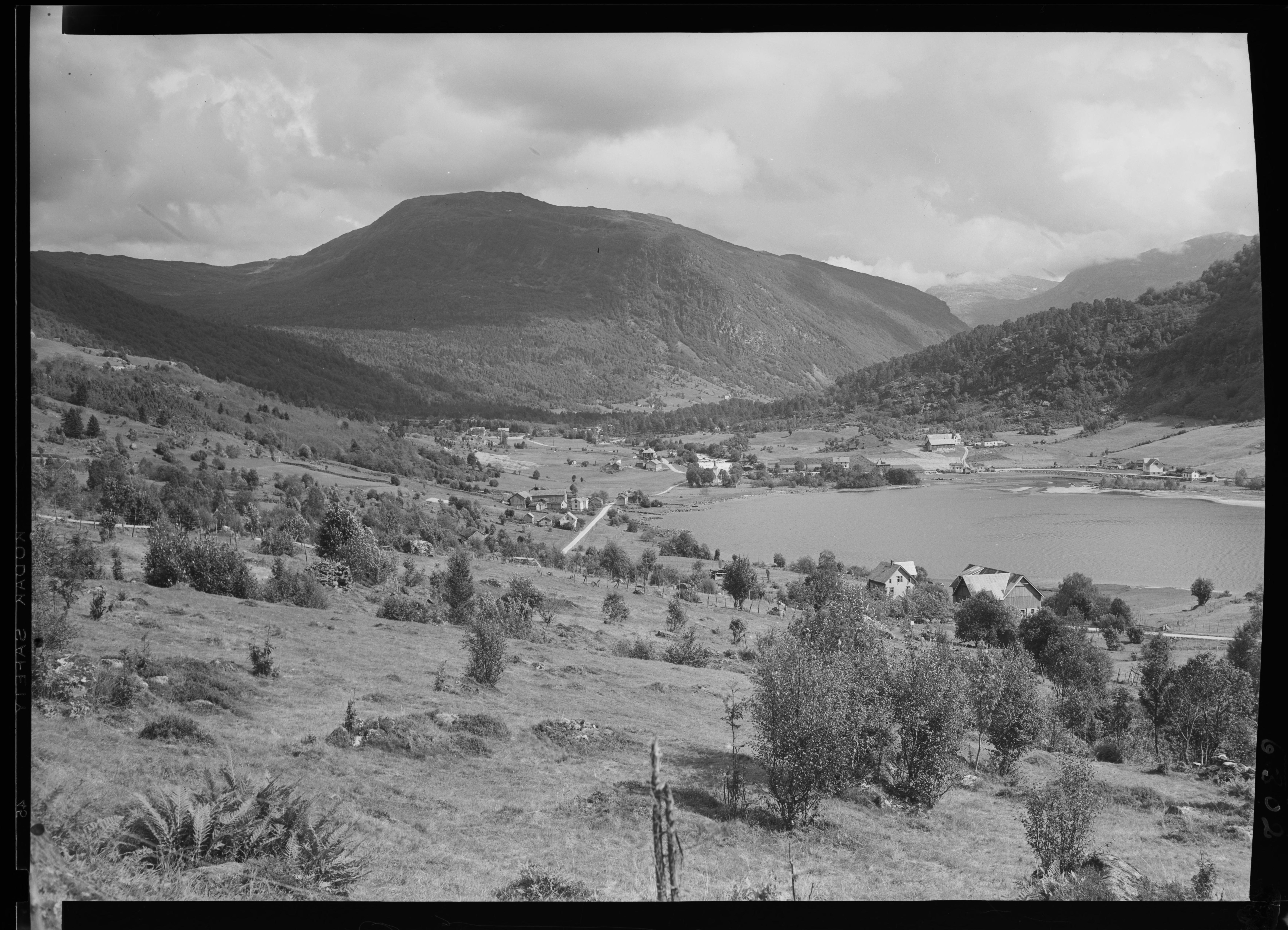 Bildet er hentet fra Nasjonalbibliotekets bildesamling. Anmerkninger til bildet var: Fotograf :Ukjent Venevassegga,Vik,Viksdalsvatnet, Gaular, Sogn og Fjordane